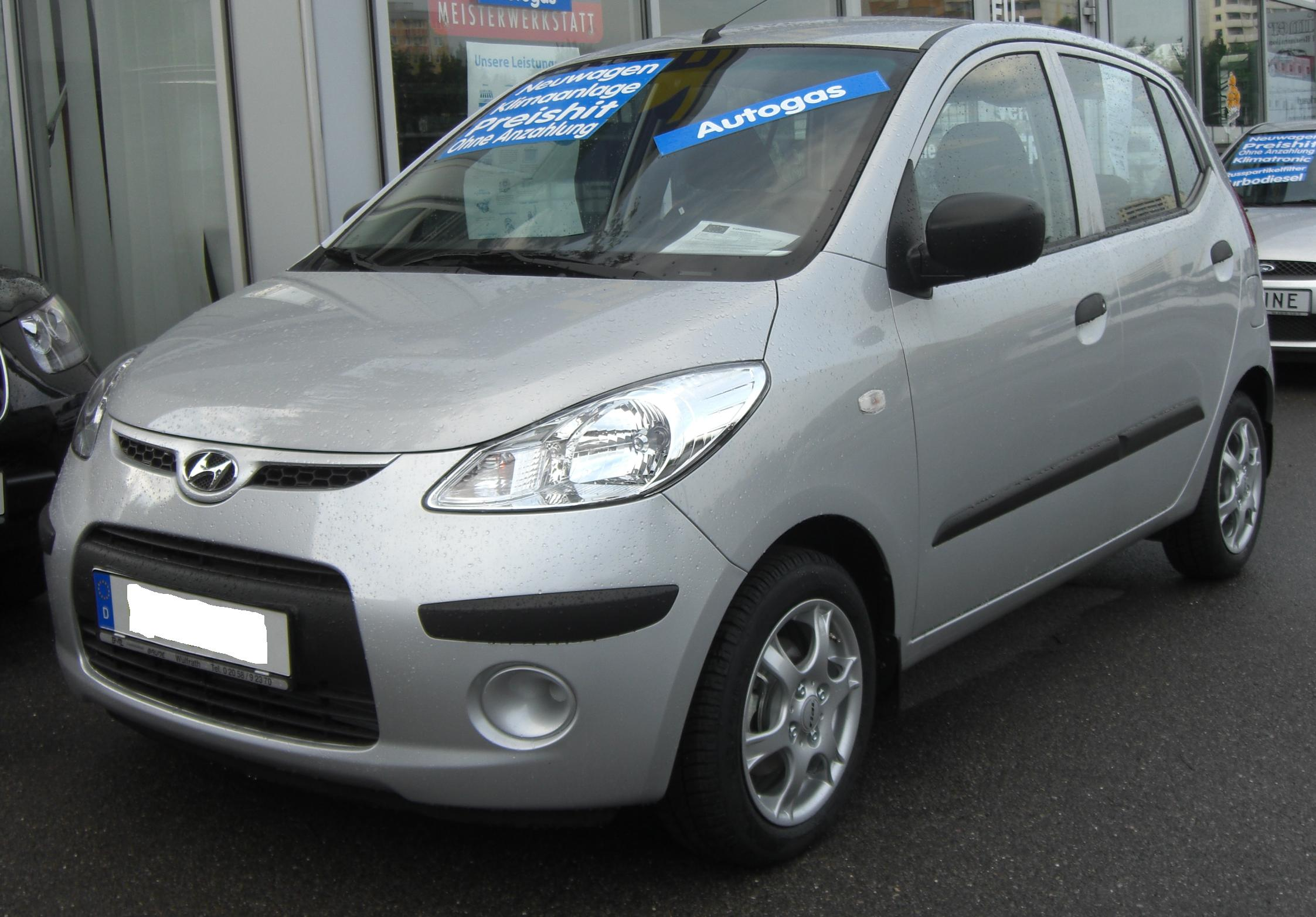 Hyundai i10